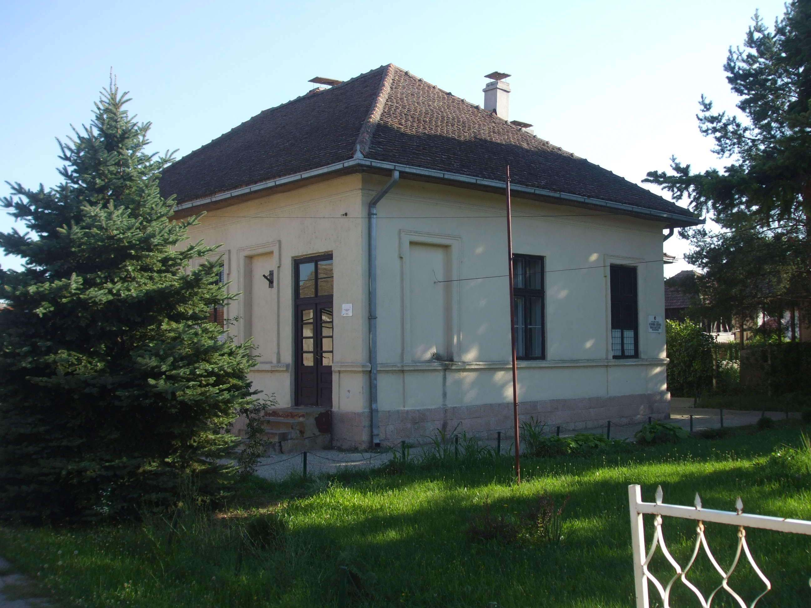 Школа у Наталинцима